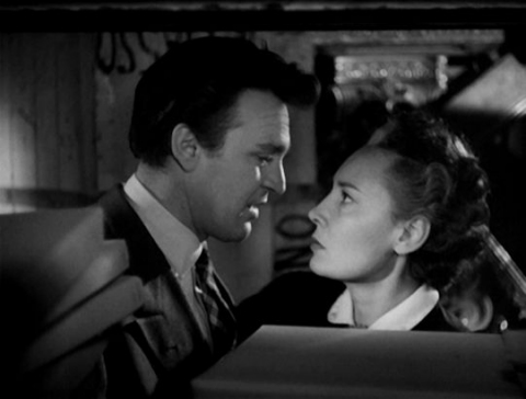 Screenshot del film I vitelloni (1953)